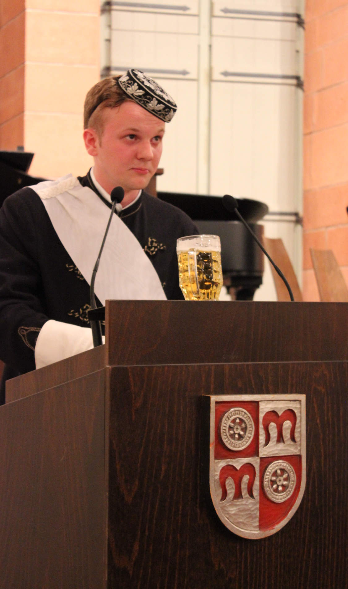 Rede des Vorsitzenden ev Karlsruhensia zu Heidelberg im Innern des Alten Rathauses zur 100. Tagung des Miltenberger Rings